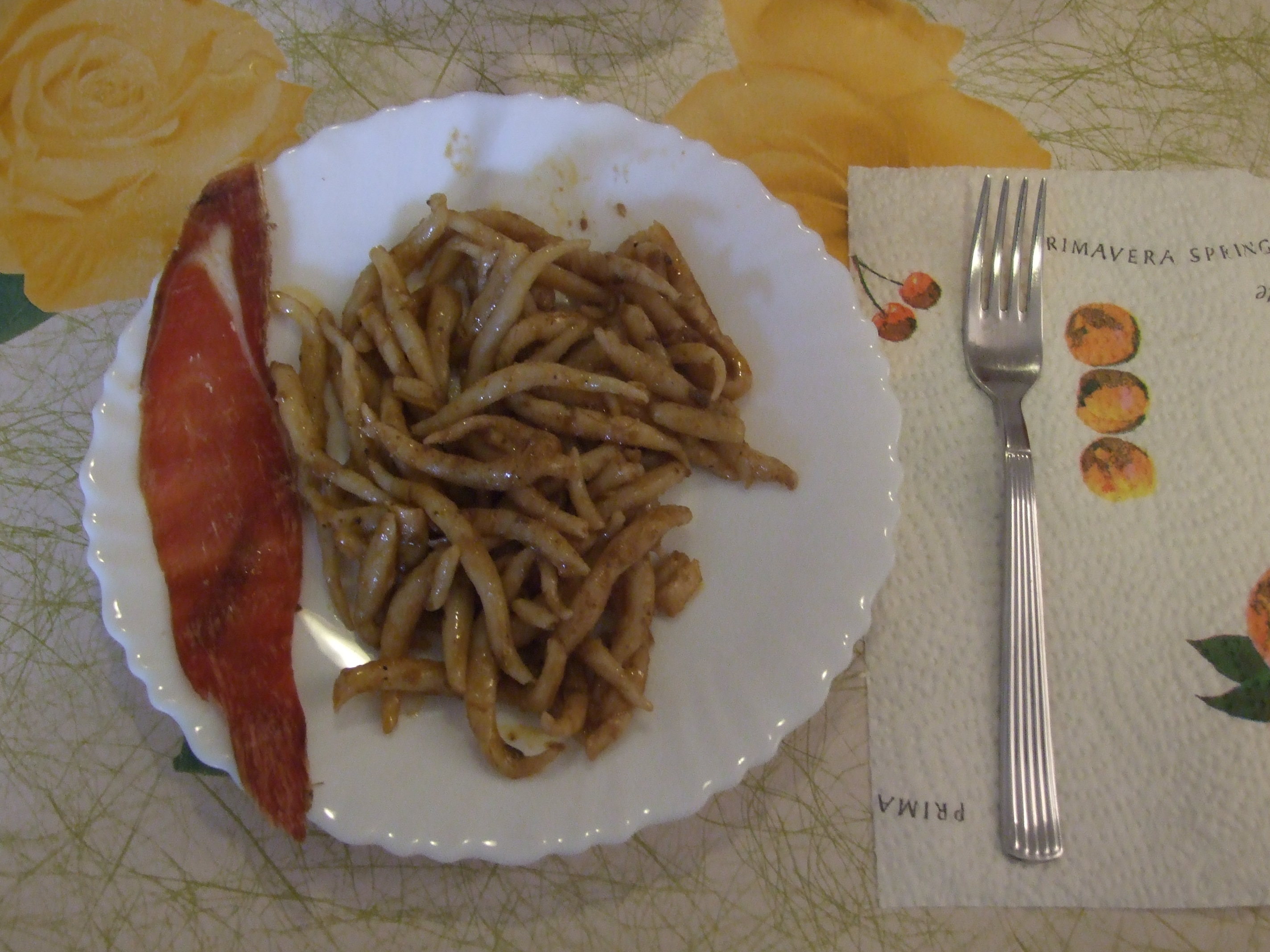 Pljukanci, pasta típica de Istia, Croacia